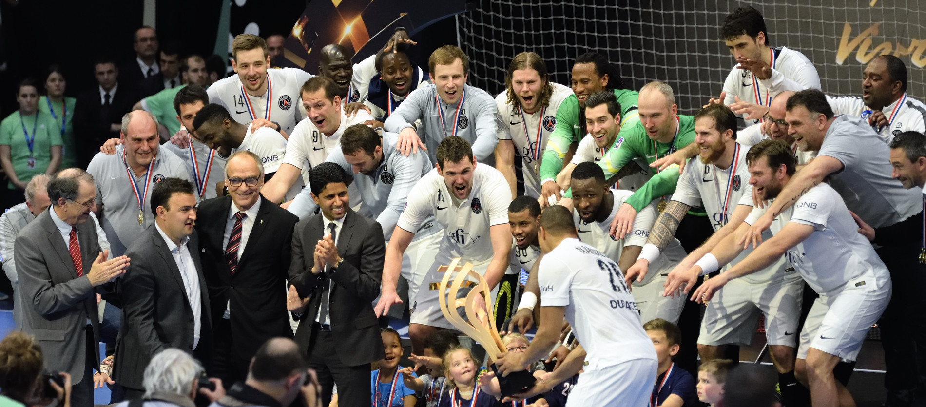 Le PSG Handball, vainqueur de la Coupe de France de handball. Au stade Pierre de Coubertin à Paris 16e, le 26 avril 2015.